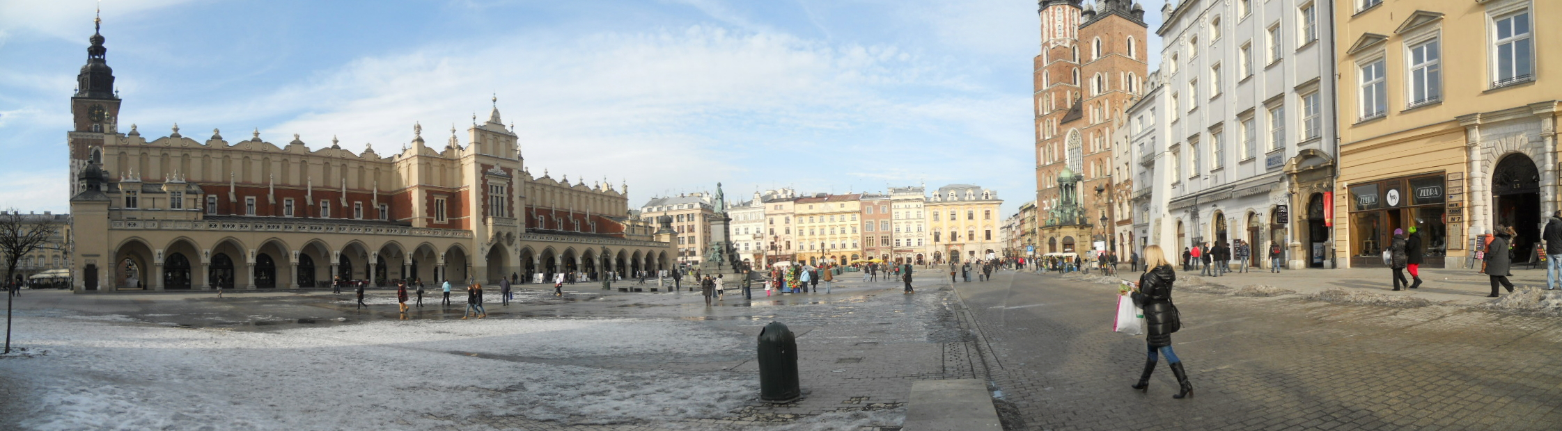 Panorama Rynku Głównego w Krakowie.